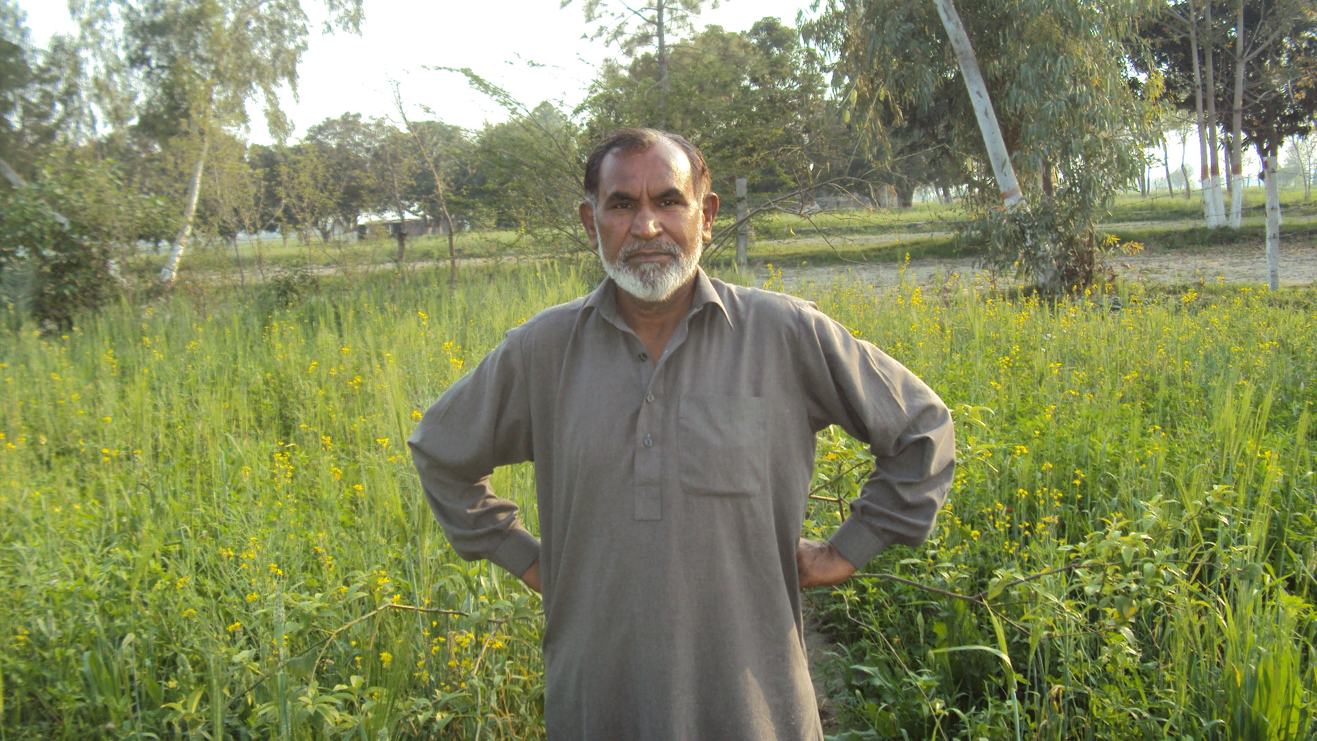 پیامی صاحب کی تصویر